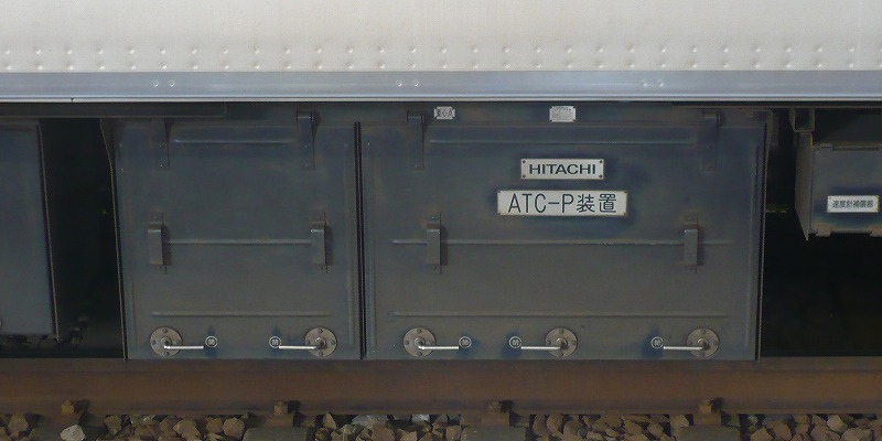 Y000系のATC装置